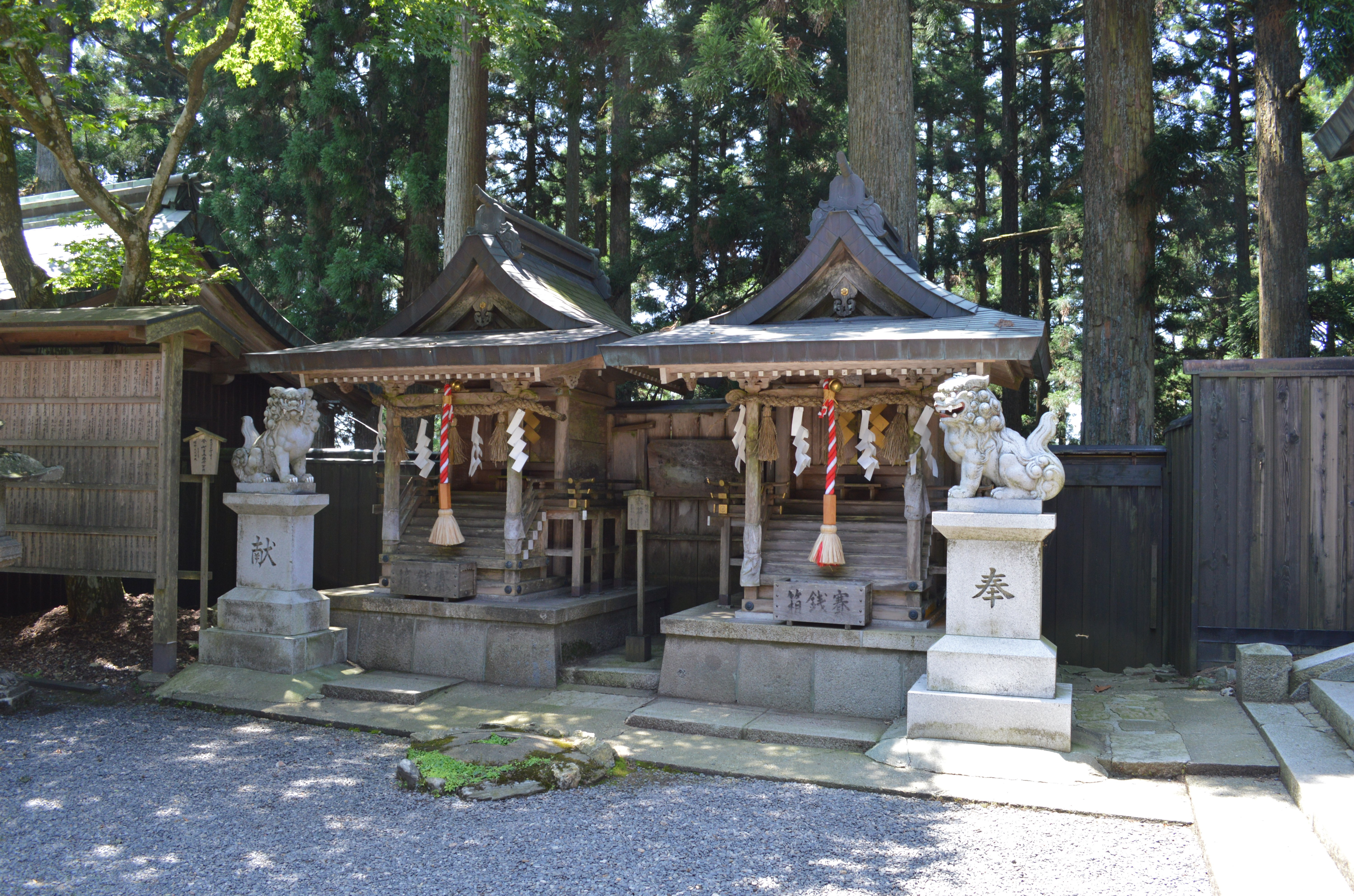 愛宕神社 (京都市) 神明社・熊野社